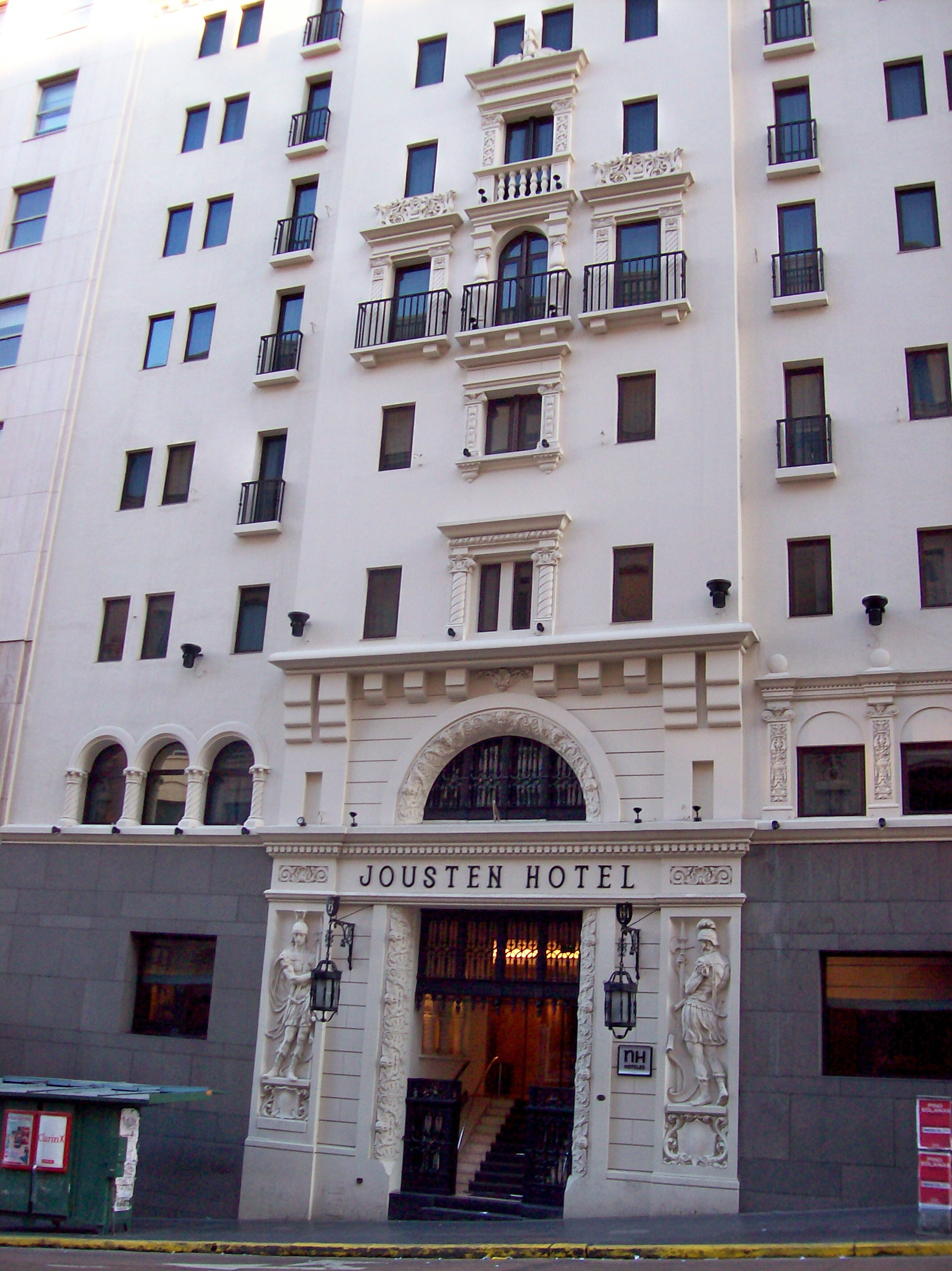 Avenida Corrientes (Ciudad de Buenos Aires), Hotel Jousten